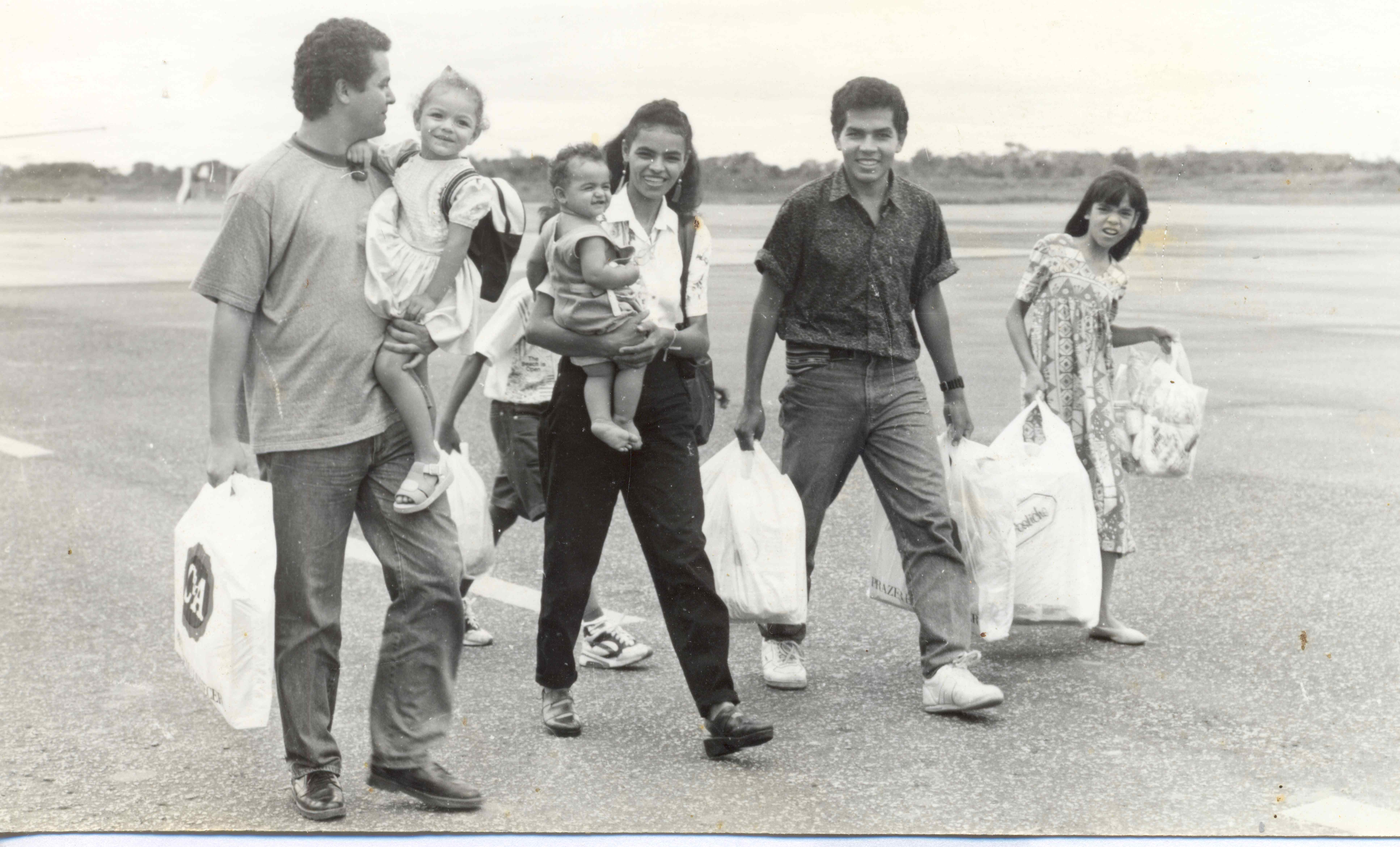 Chegada no Acre com a familia (1993)